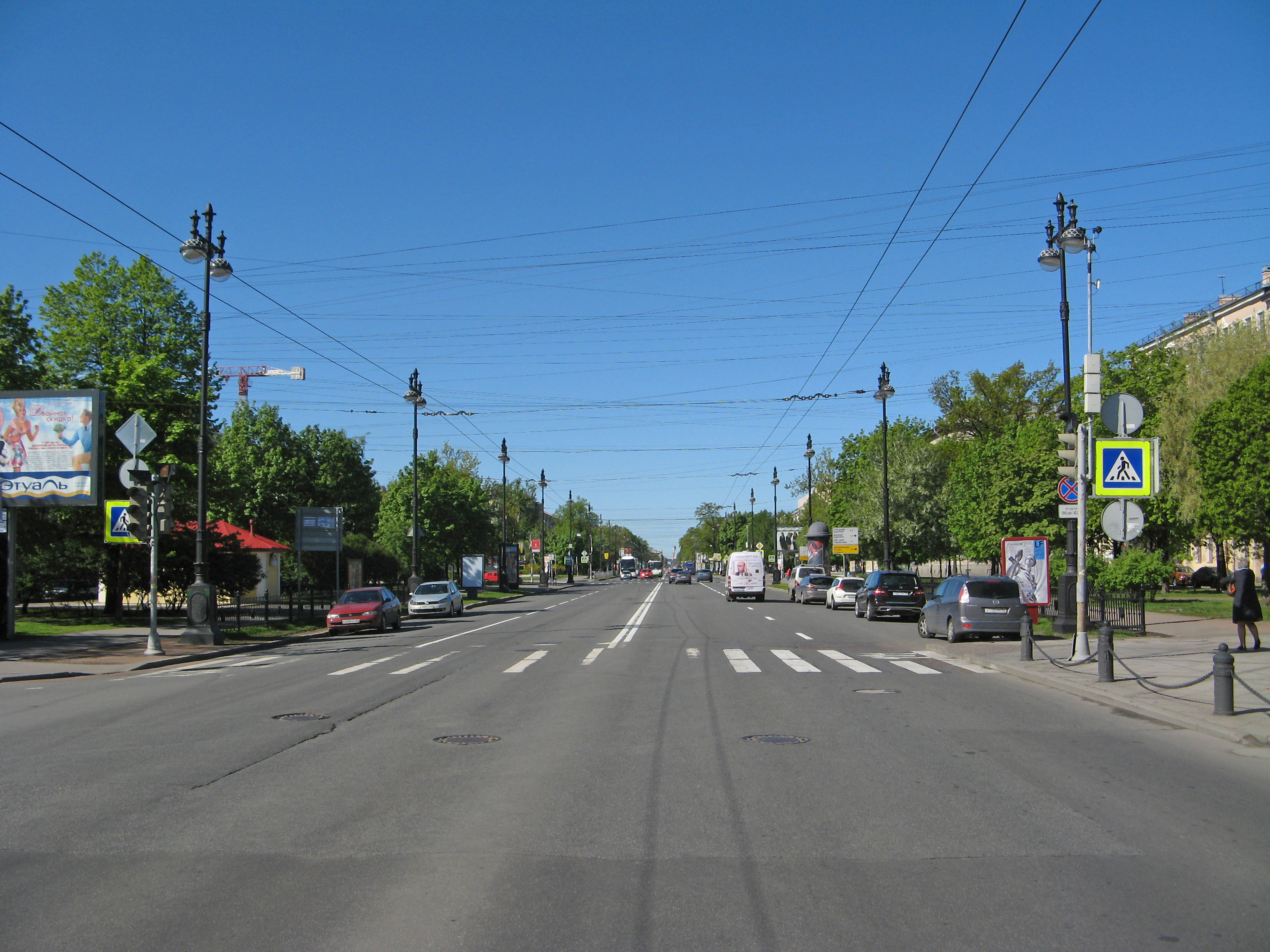 Большой проспект Васильевского острова, Санкт-Петербург